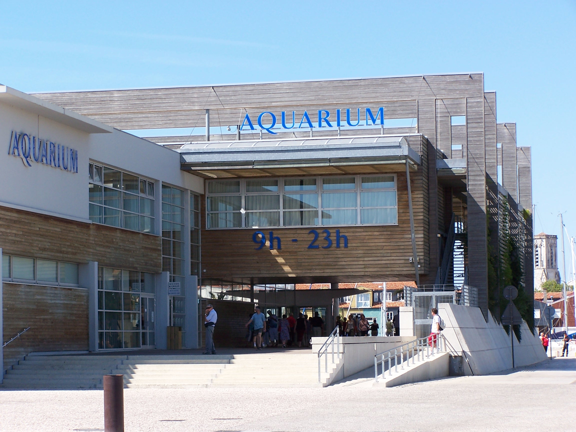 Photographie de l'entrée de l'Aquarium de La Rochelle.